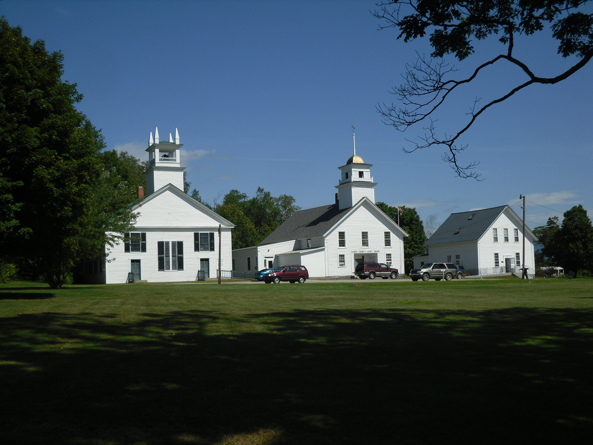 Guildhall, Vermont.